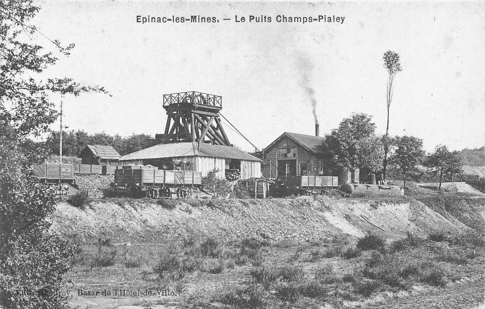 Le puits Champs-Pialay des Houillères d’Épinac.